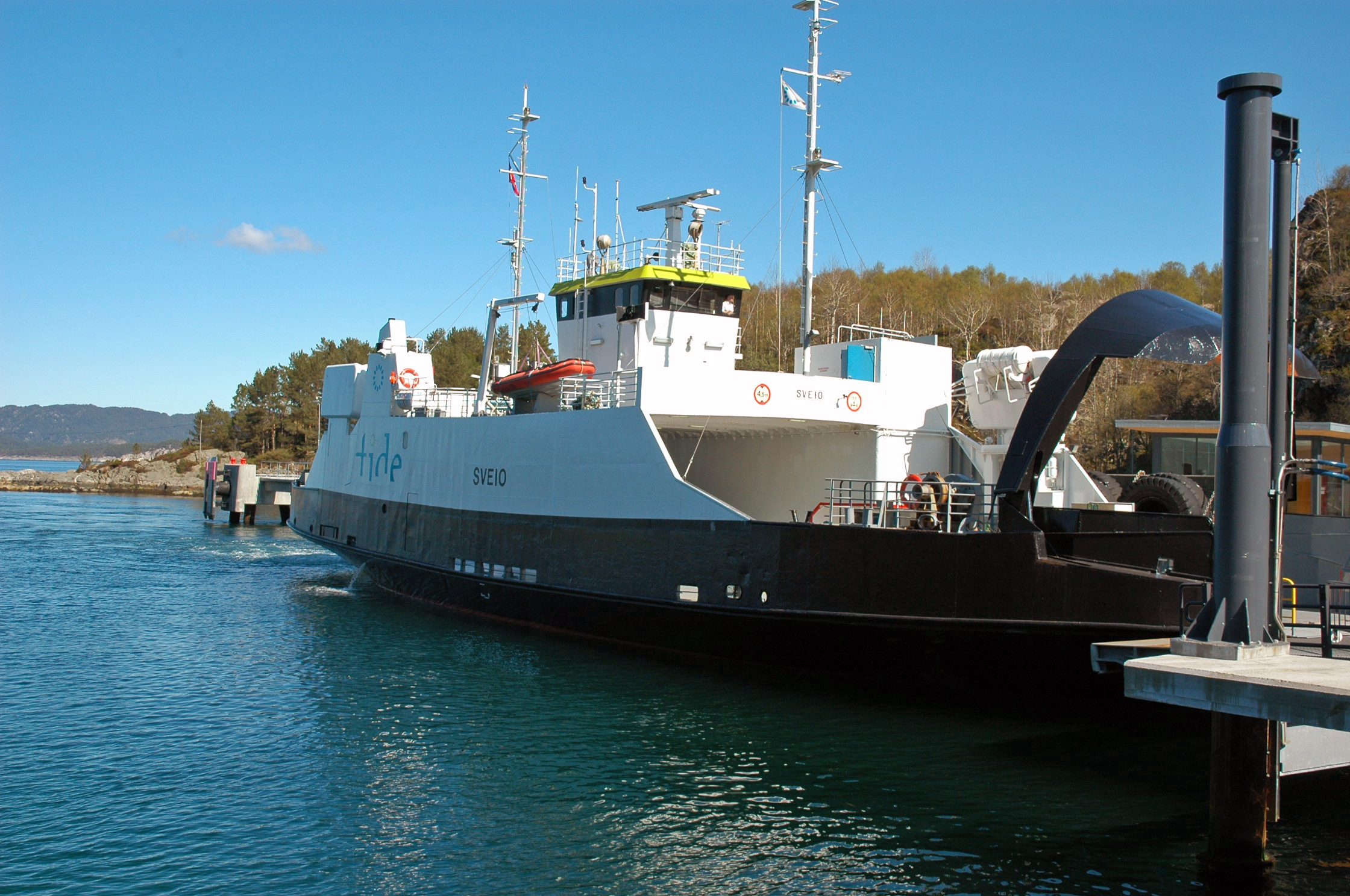 MF Sveio ved kai i Sandvikvåg